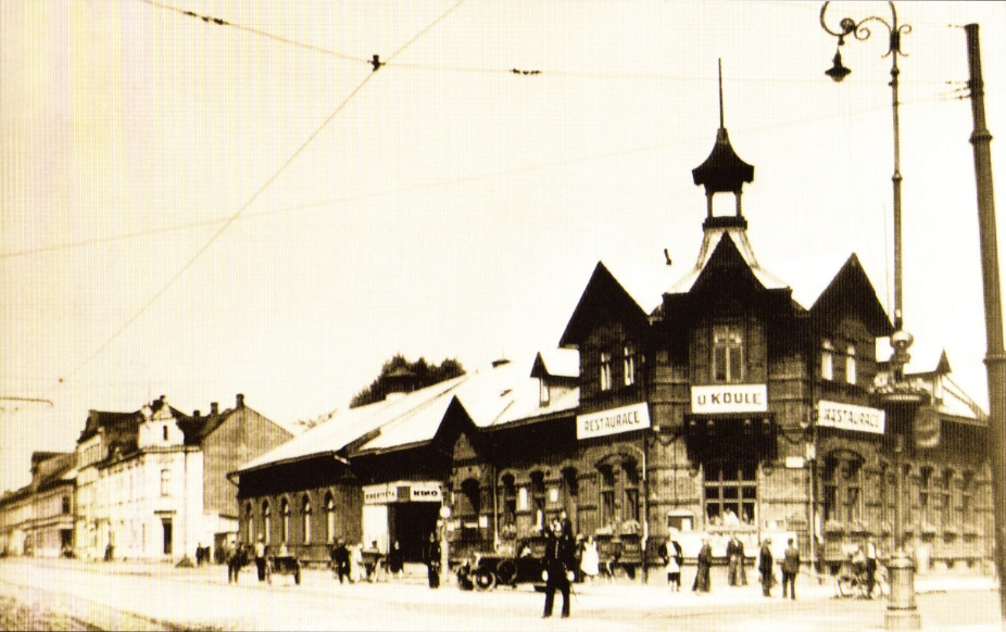 Hostinec u Koule / U Koule Restaurant